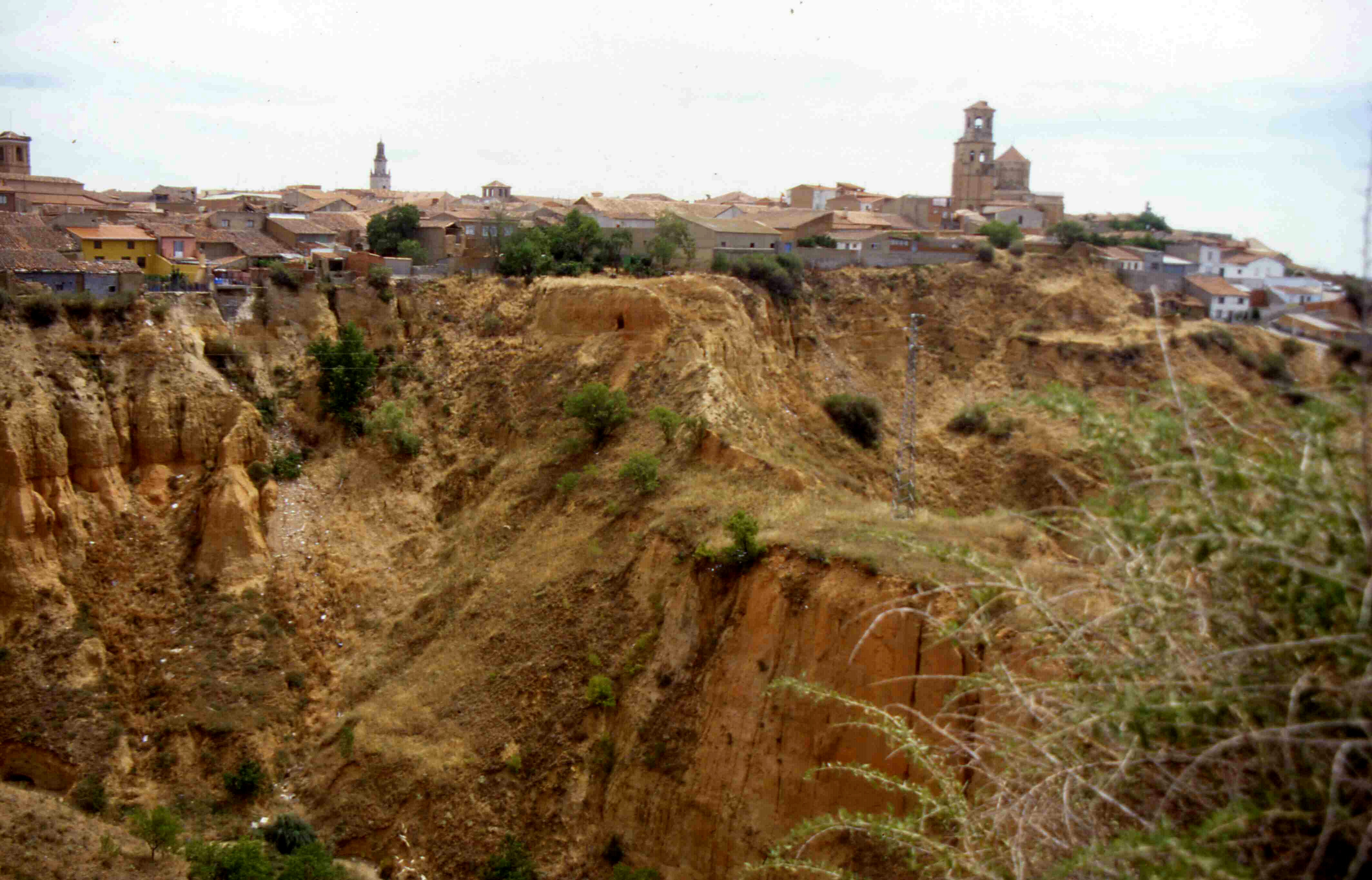 Toro Ansicht 2